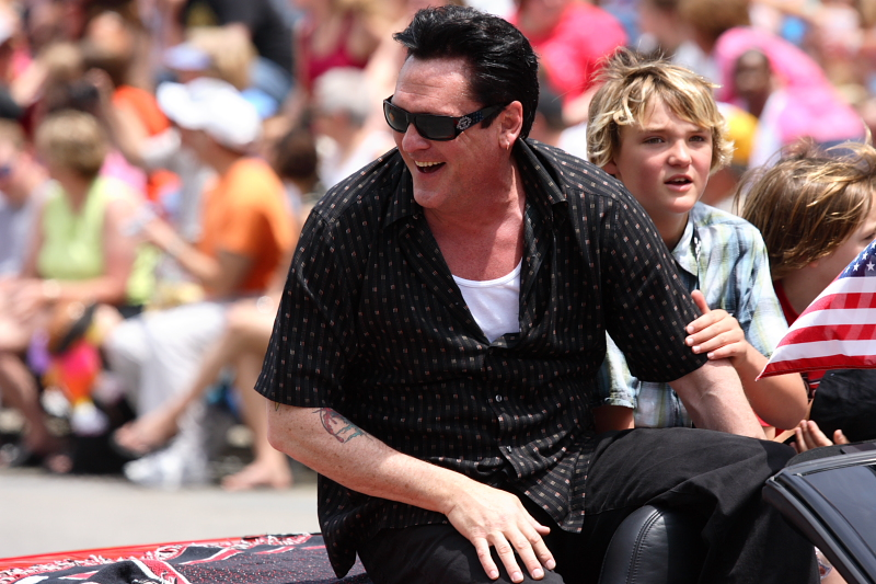 Michael Madsen 2006-05-27